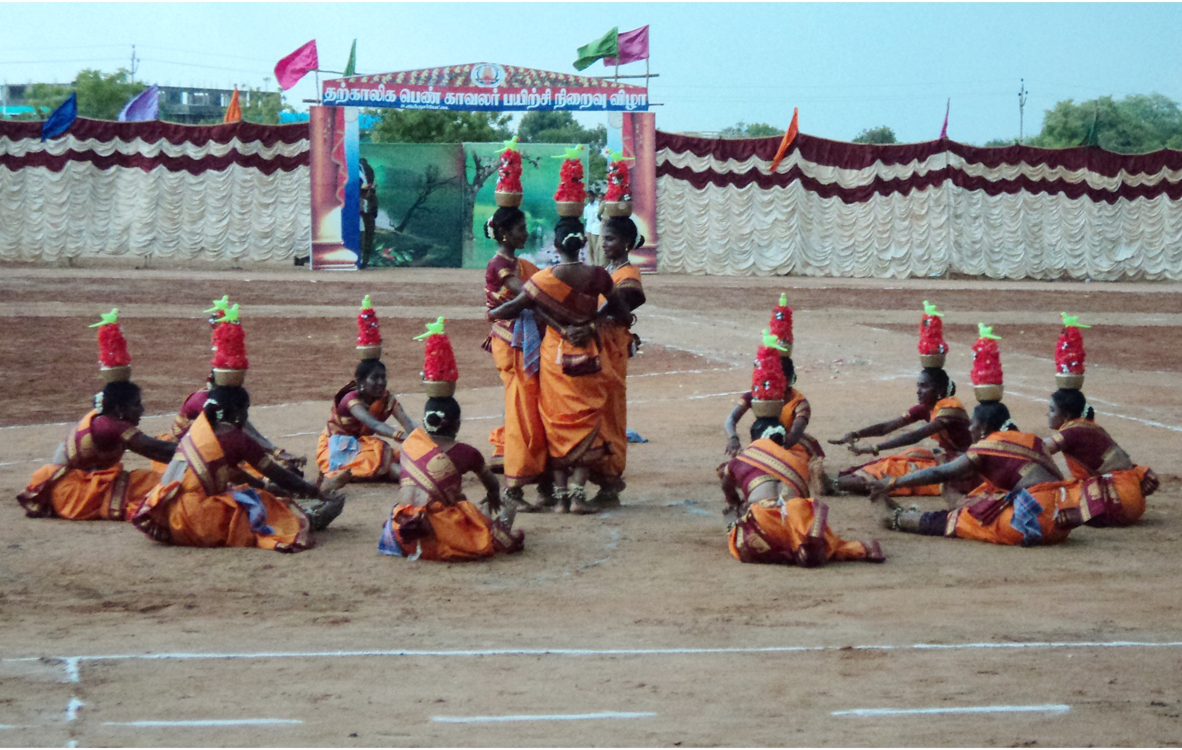 கரகாட்டம்